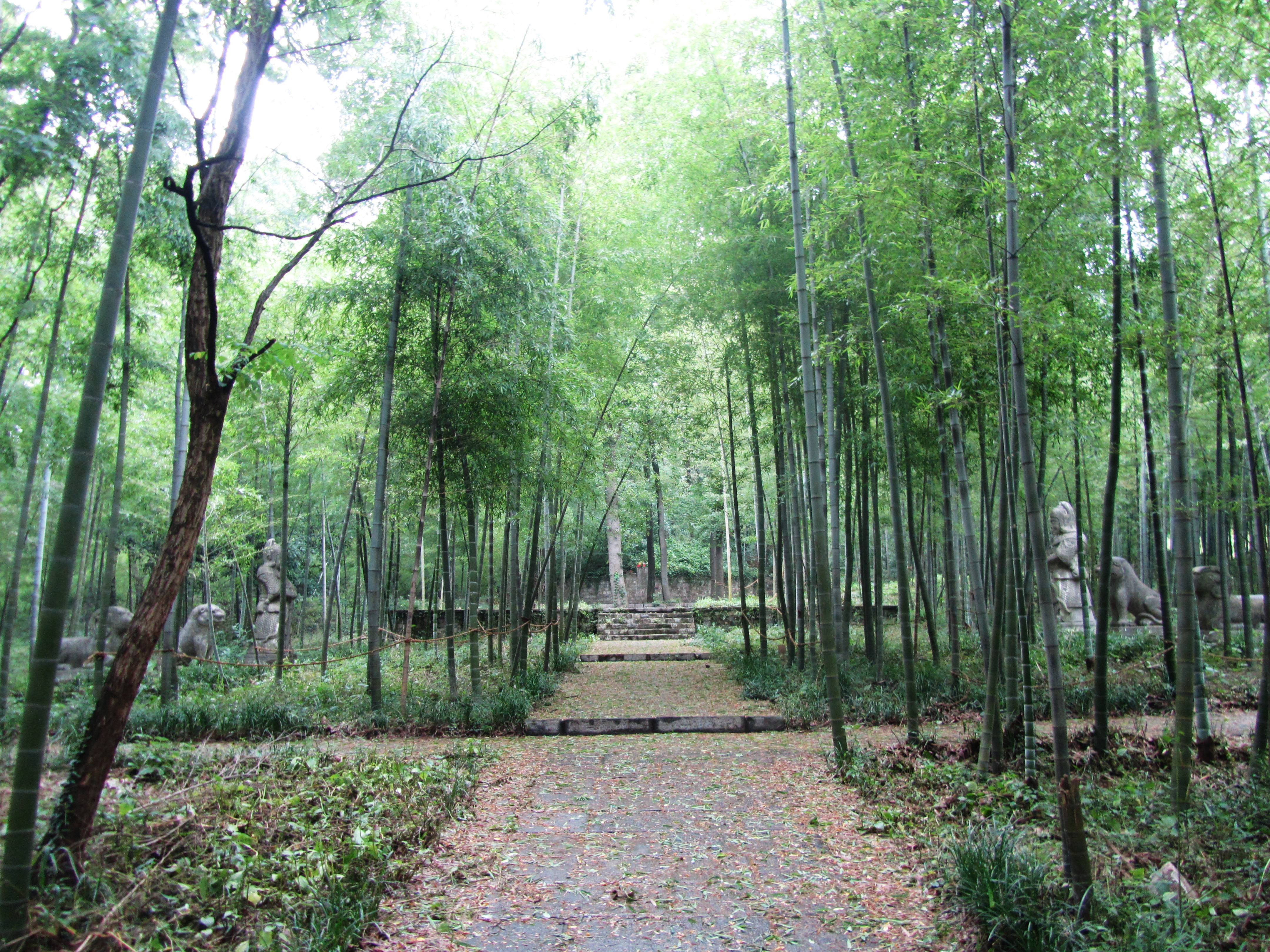 常遇春墓，神道。